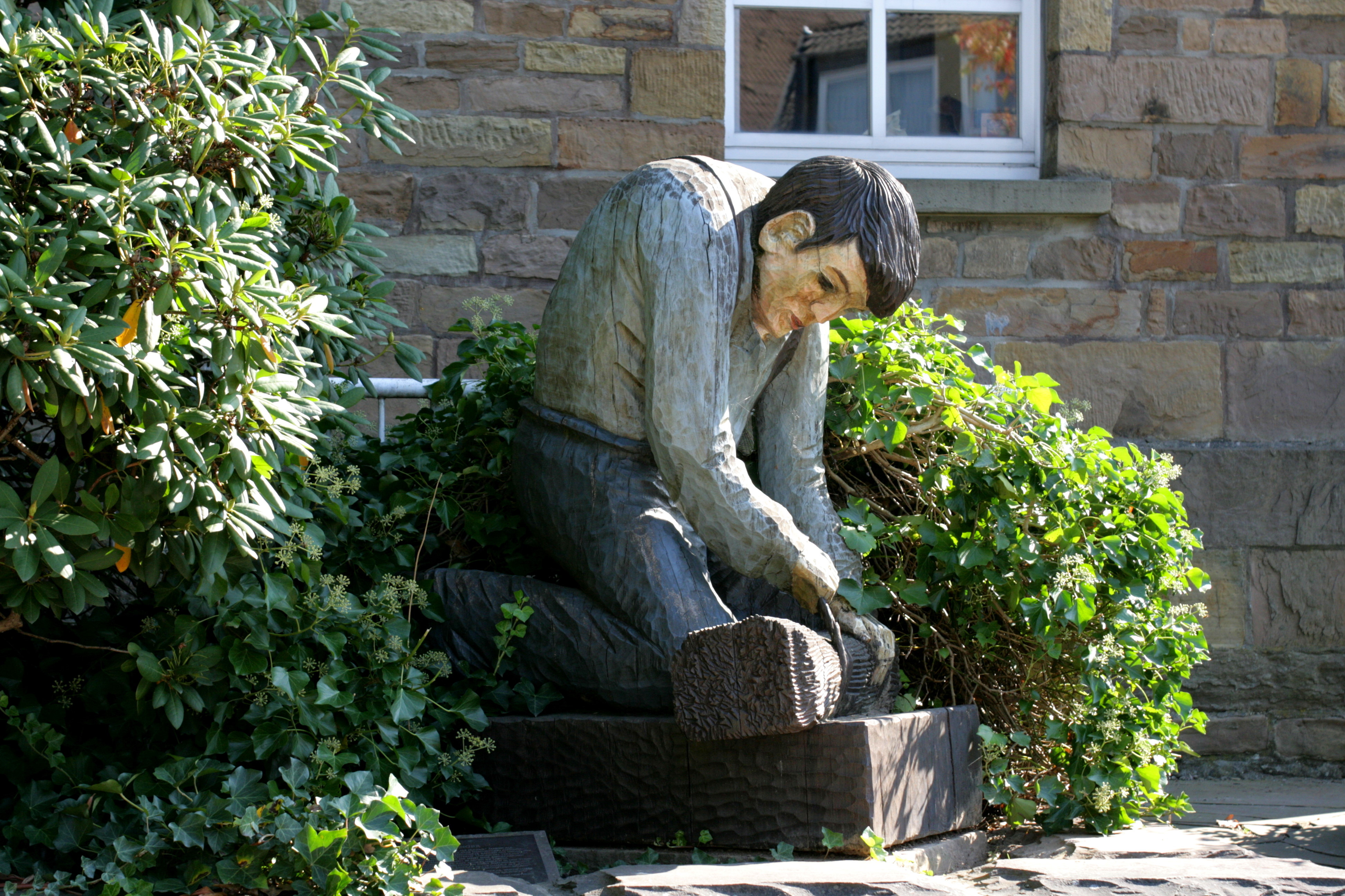 Lenkeler Bessemsbenger, Eichenhofstraße in Lindlar